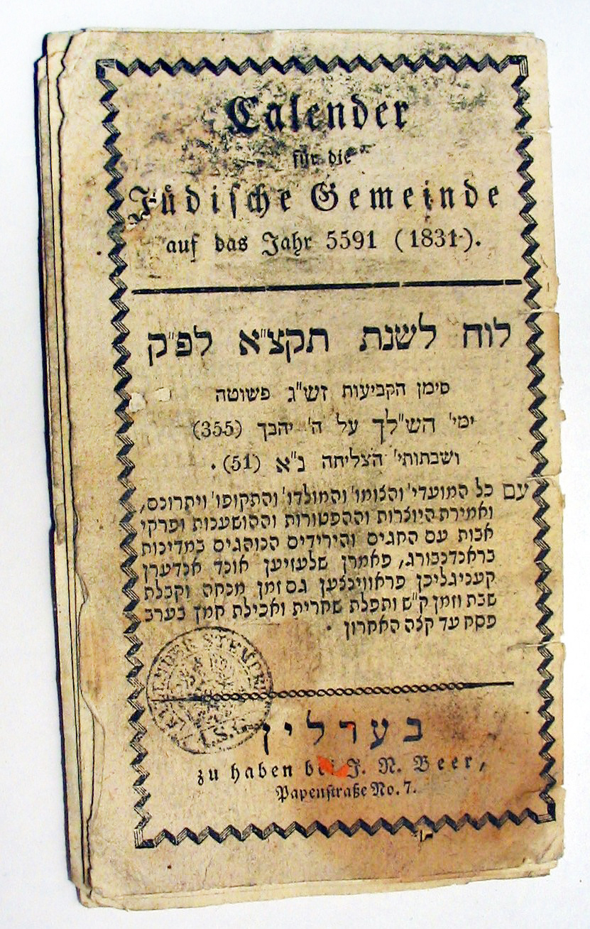 Deiziadur hebraek evit ar bloavezh 5591 (1831)